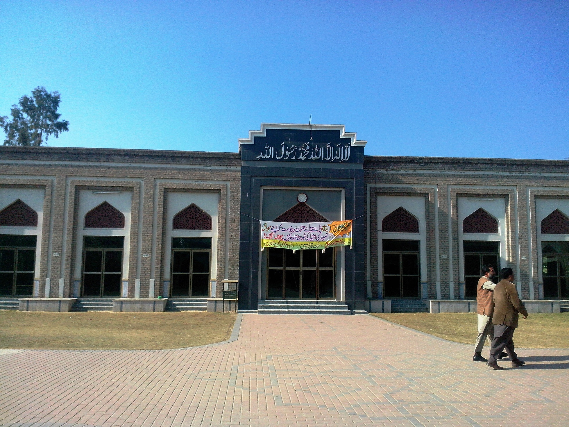 Markazi Janaz Gah (Funeral Prayer Place), Okara